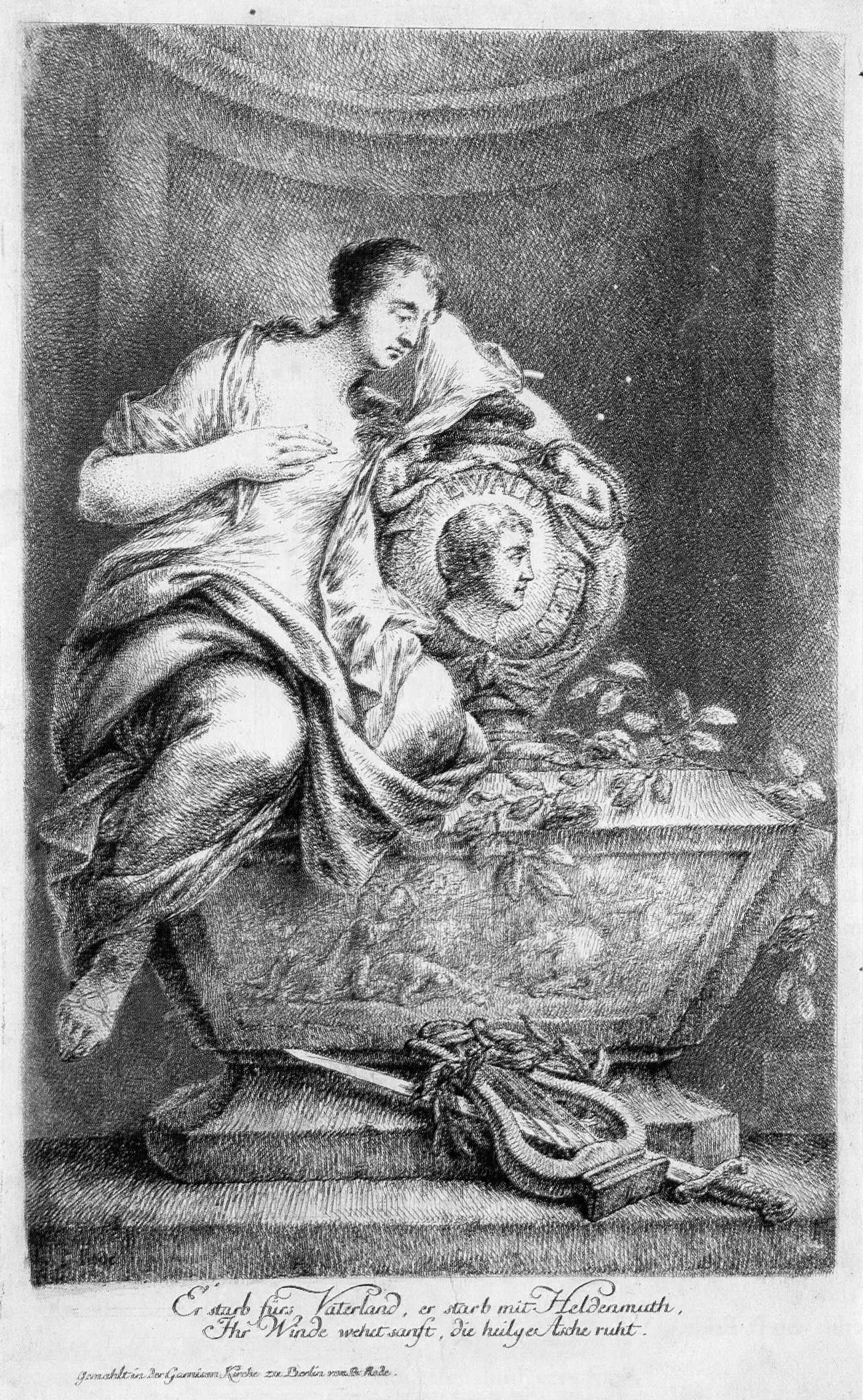 Christian Bernhard Rode: Denkmal auf Ewald Christian von Kleist, Medaillon auf dem Sarkophage von der Göttin der Freundschaft gekrönt. Radierung, 38,2 x 23,5 cm. Text: "Er starb fürs Vaterland, er starb mit Heldenmuth, / Ihr Winde wehet sanft, die heilige Asche ruht."